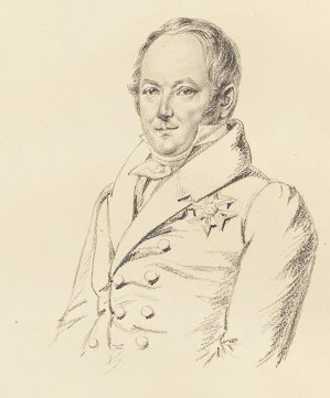 Weigel, Christian Erenfried von (1776-1848)